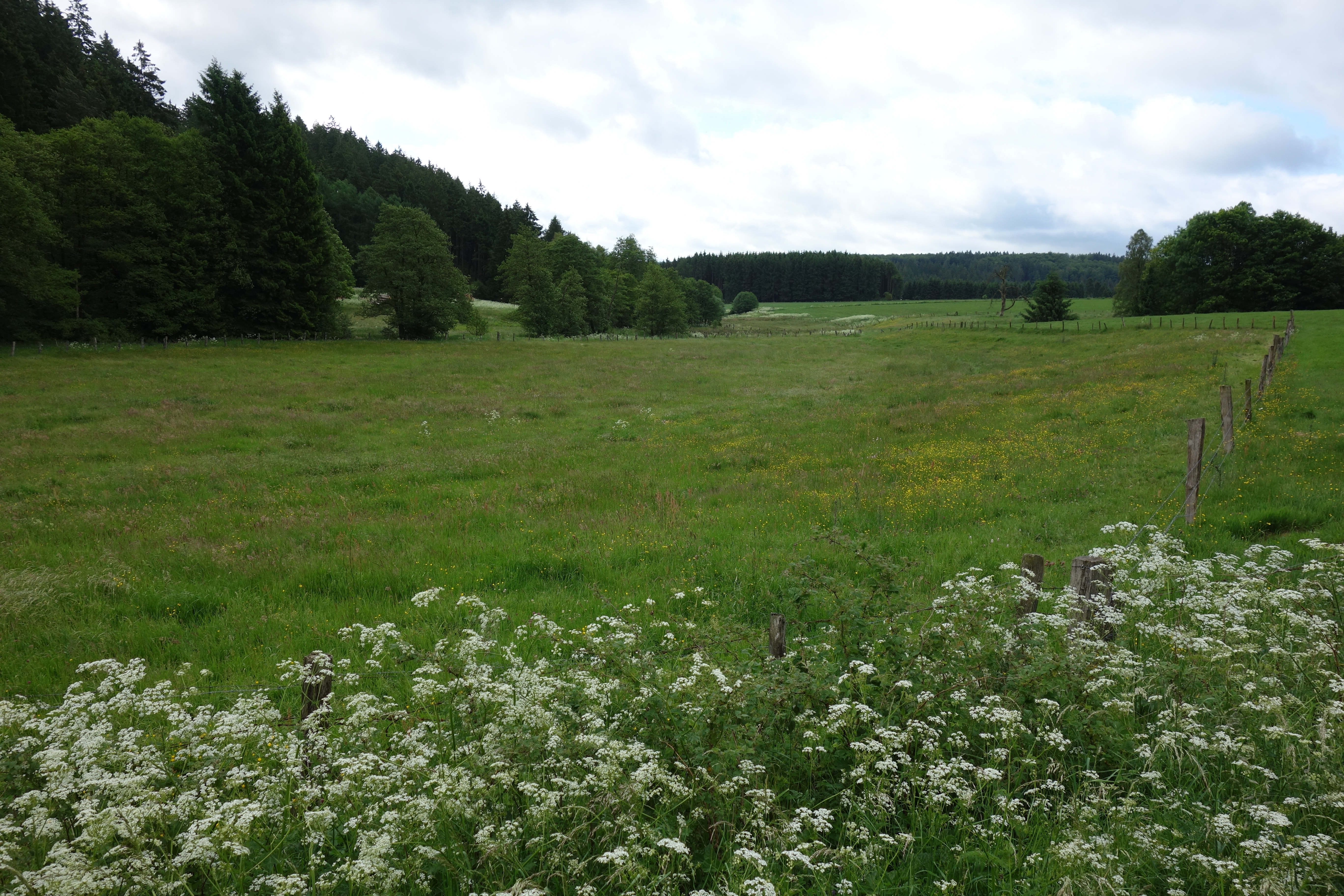 Bereich vom östlich Teil vom Naturschutzgebiet Aabachtal.